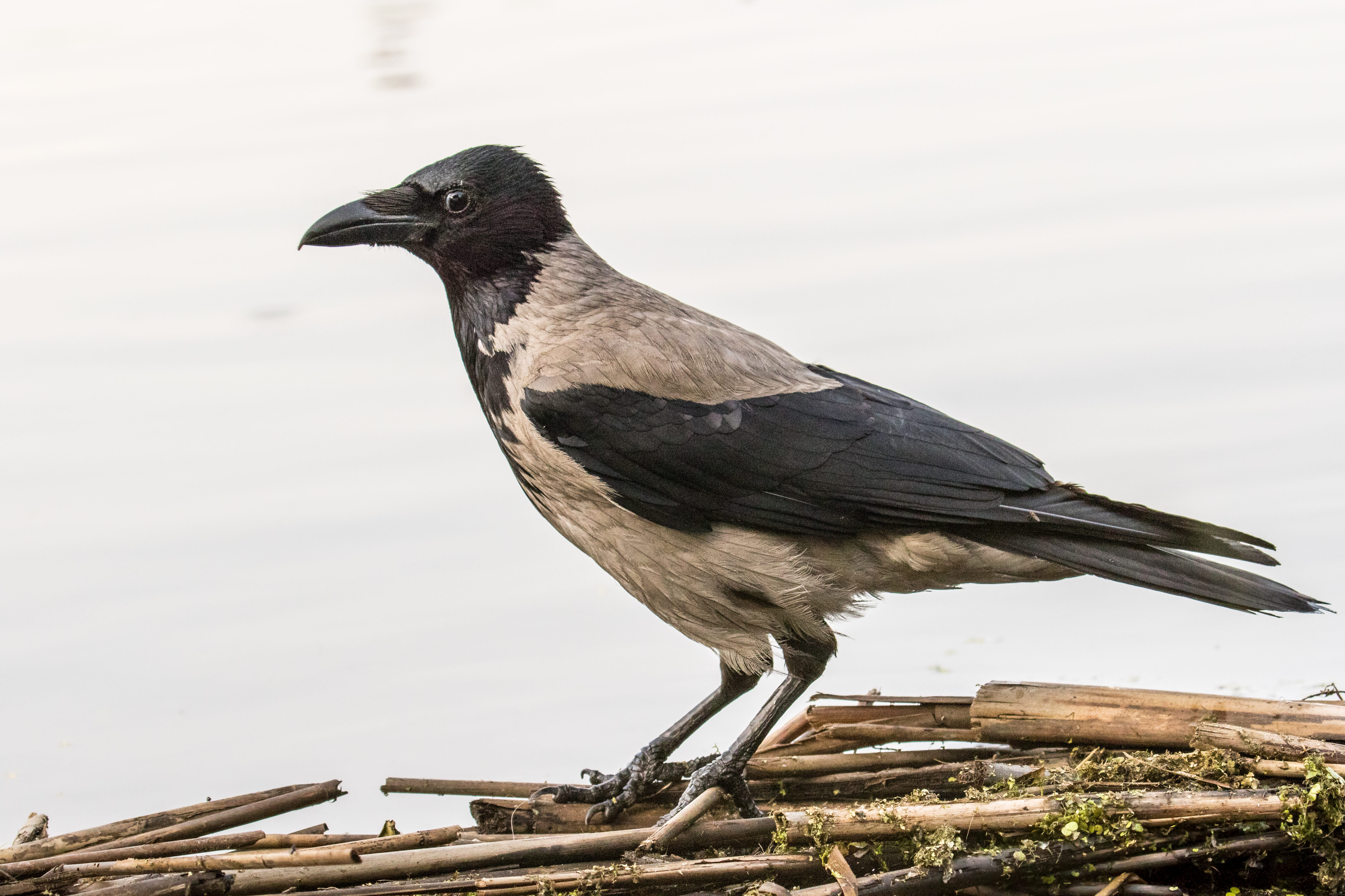 Taken in Hungary.